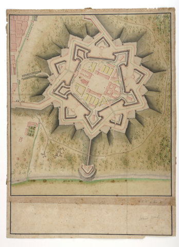 Planta de la Ciutadella (segle XVIII)